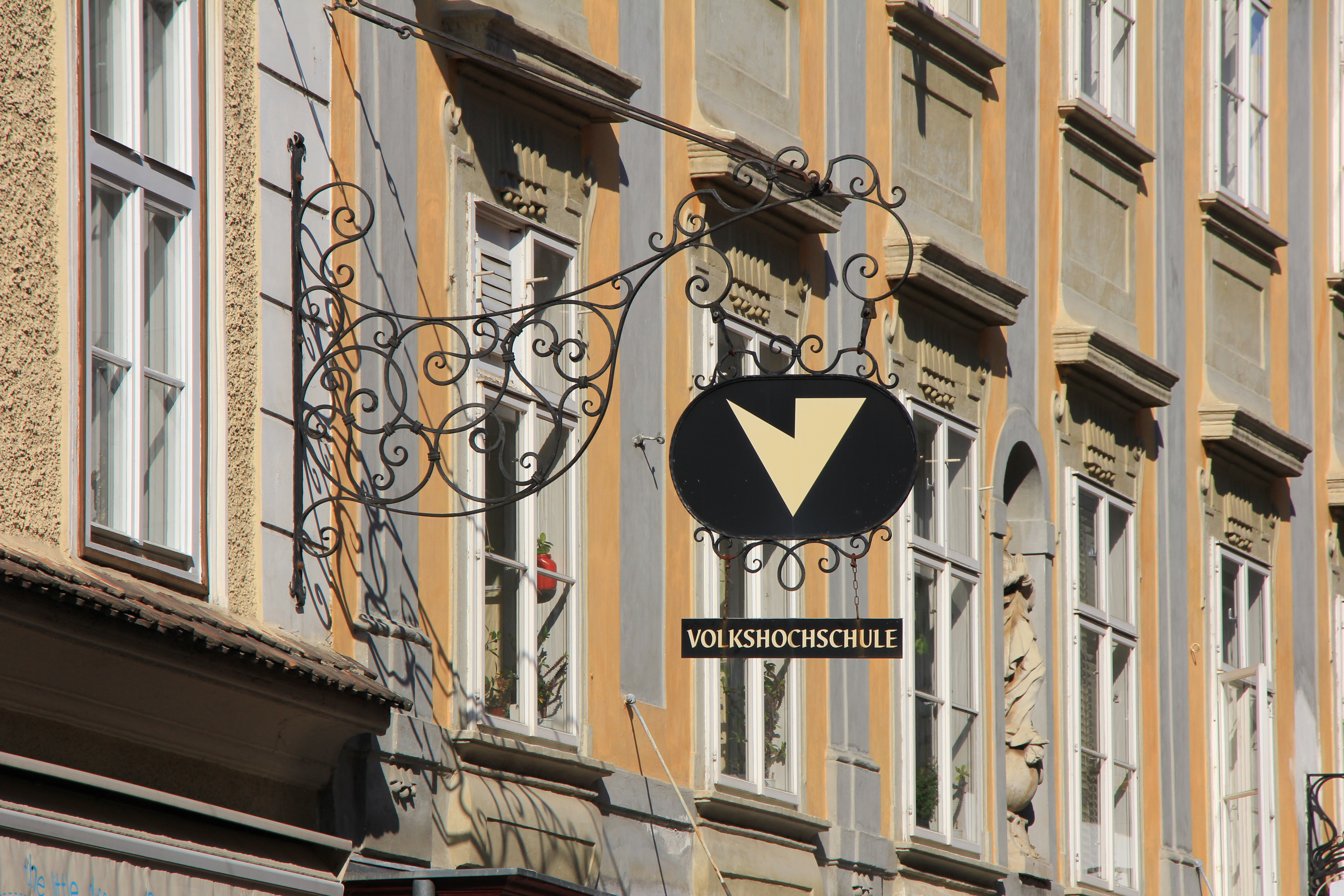 Nasenschild der Volkshochschule in der Kremser Altstadt